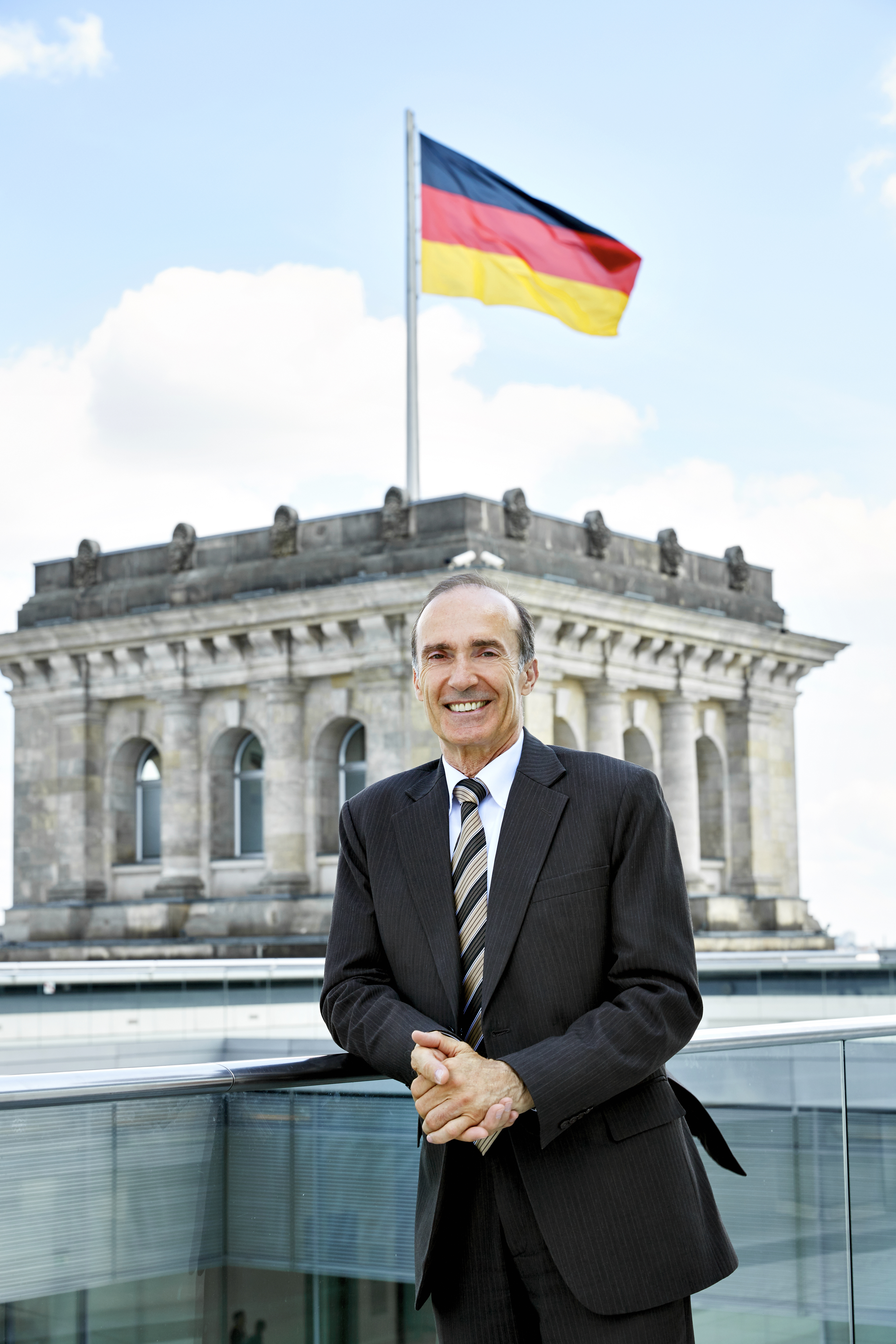 Eberhard Gienger MdB (2017)